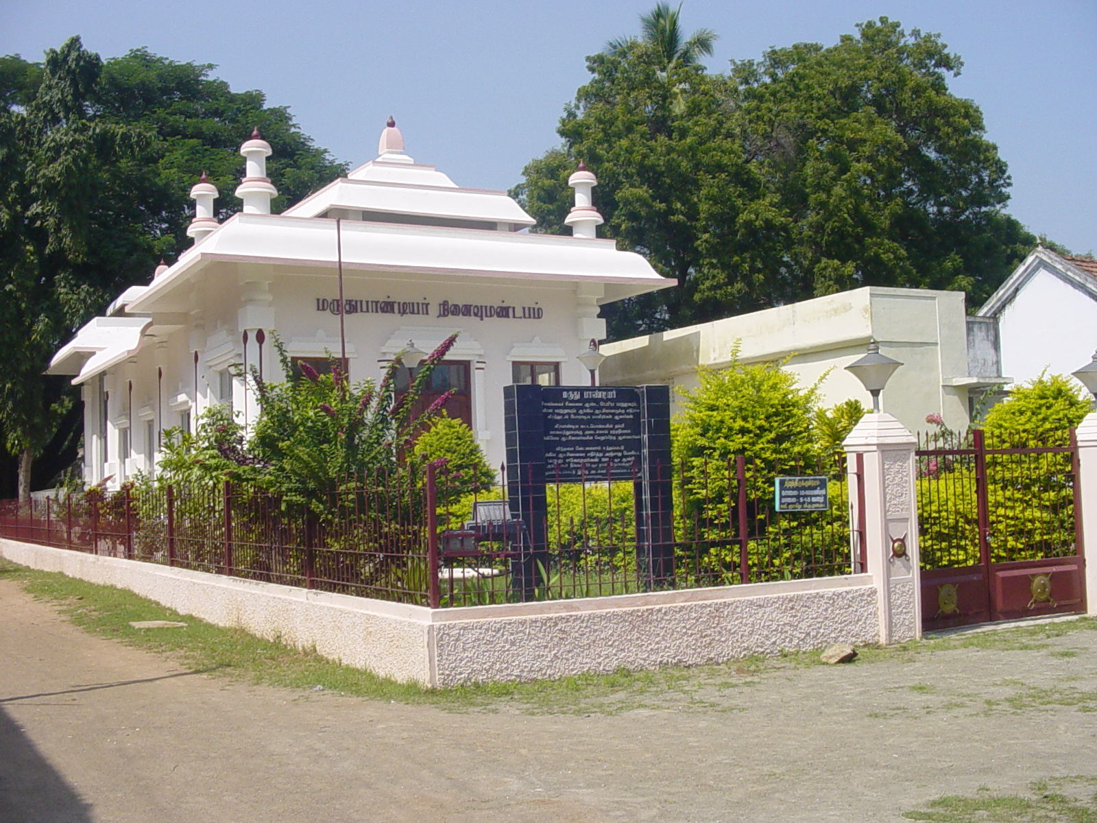 சிவகங்கைச் சீமையை ஆண்ட பெரிய மருதுவும் சின்னமருதுவும் வீரபாண்டிய கட்டபொம்மனின் தம்பி ஊமைத்துரைக்கு அடைக்கலம் தந்ததினால் ஆங்கிலேயர்களின் வெறுப்பிற்கு ஆளாகி 1801ஆம் ஆண்டு சிவகங்கை மாவட்டம் திருப்புத்தூரில் தூக்கிலிடப்பட்டு அடக்கம் செய்யப்பட்டனர். தற்போது நினைவிடமாக விளங்குகிறது.